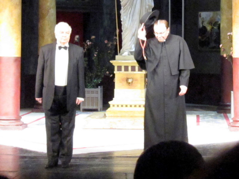 Московский Театр Сатиры. Спектакль "Орнифль". Михаил Державин (Маштю), Олег Вавилов (Отец Дюбатон)